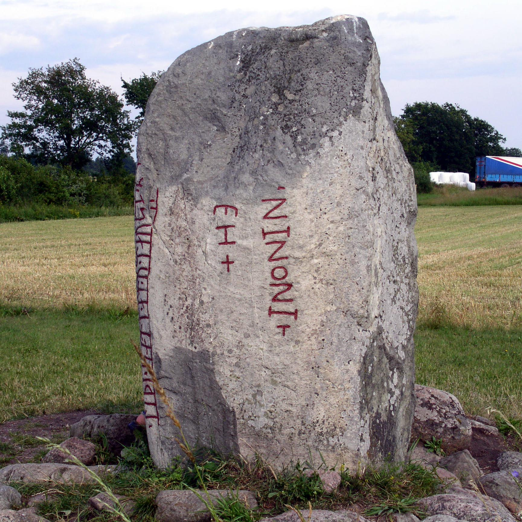 Kalevistenen, Öland (the runestone from the opposite side)